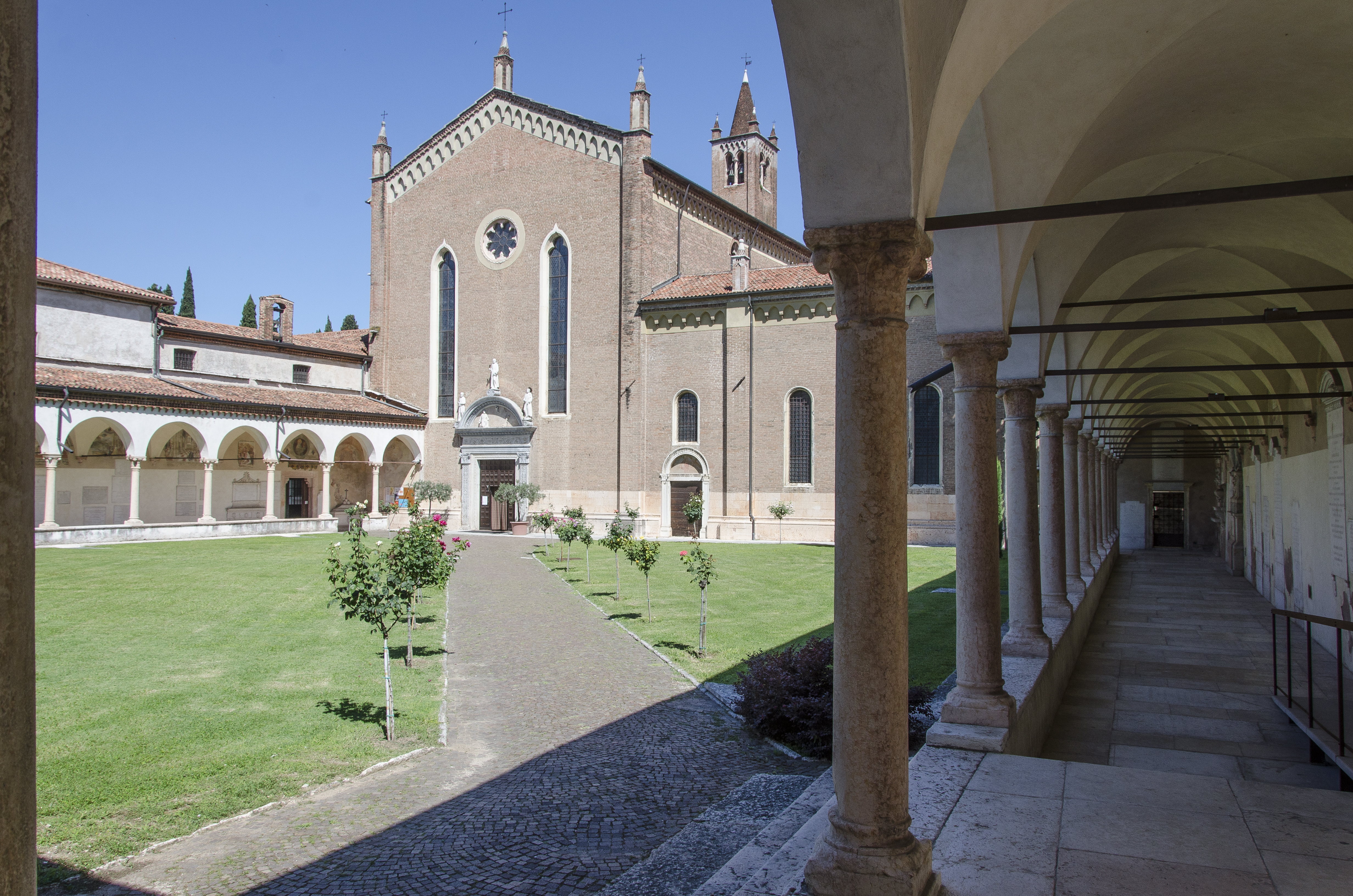 Chiesa di San Bernardino a Verona. Chiostro di Sant'Antonio